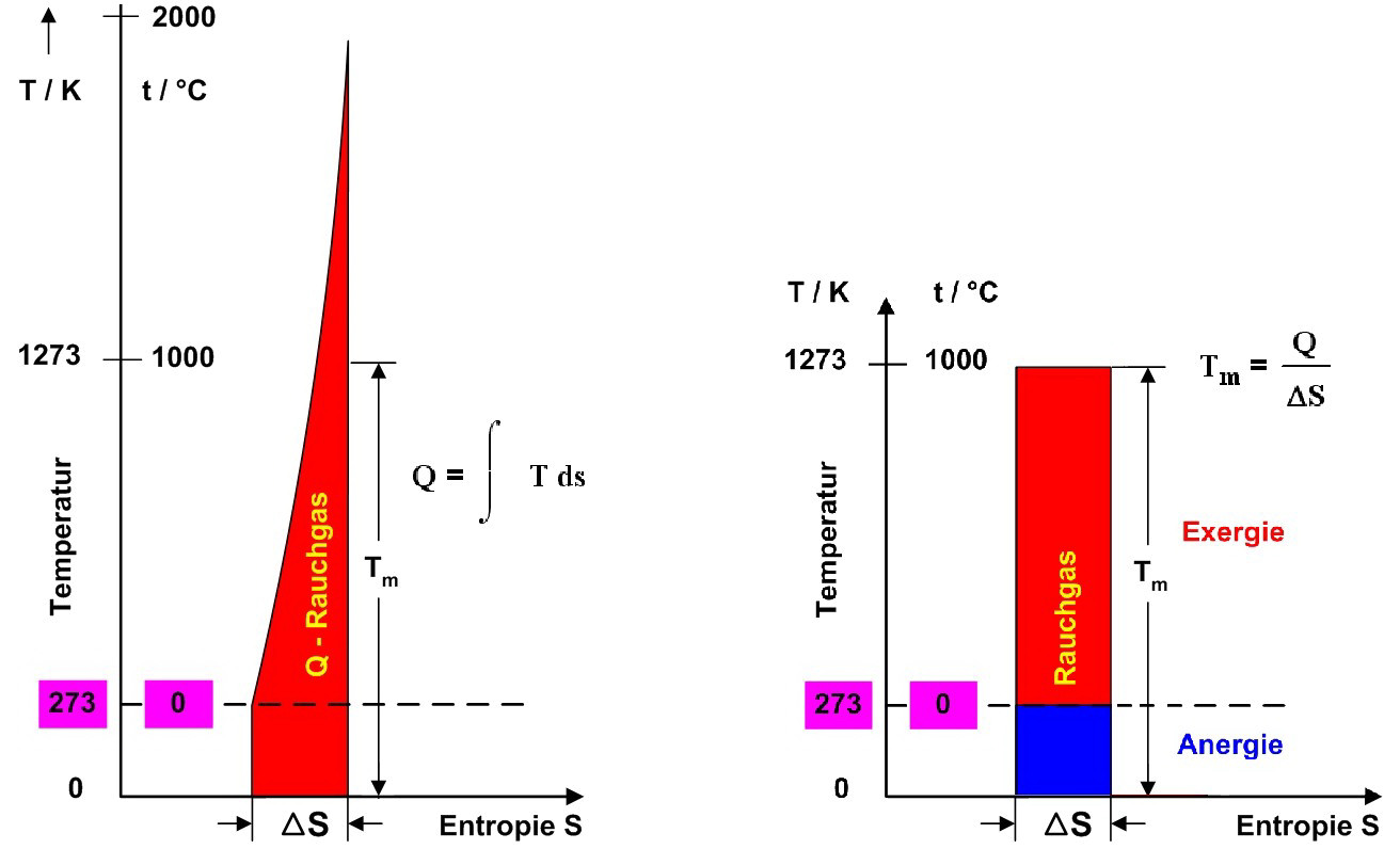 Exergie und Anergie im Rauchgas